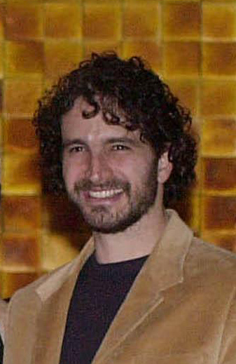 O ator brasileiro Caco Ciocler.